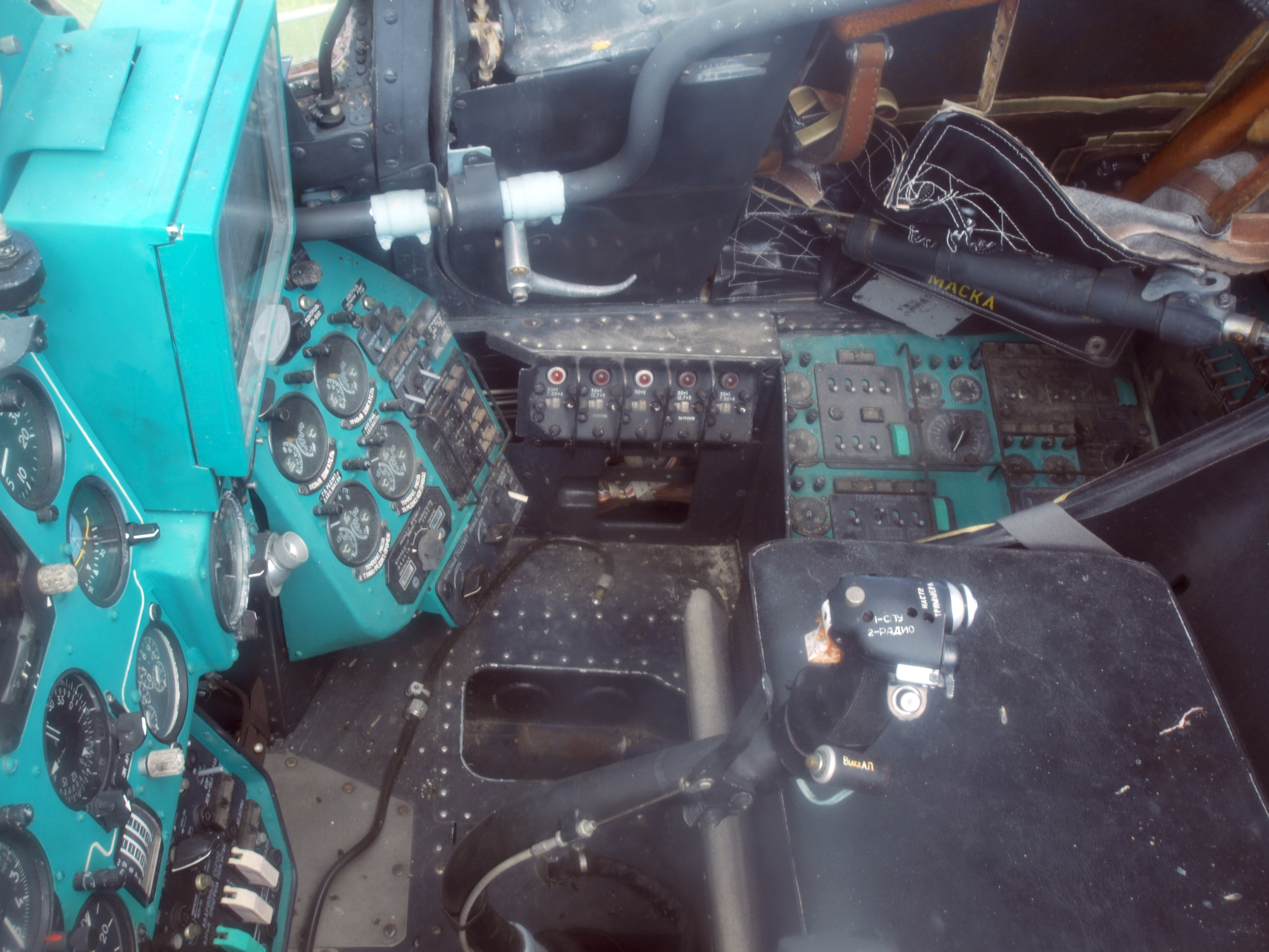 Photographed at Hermeskeil.